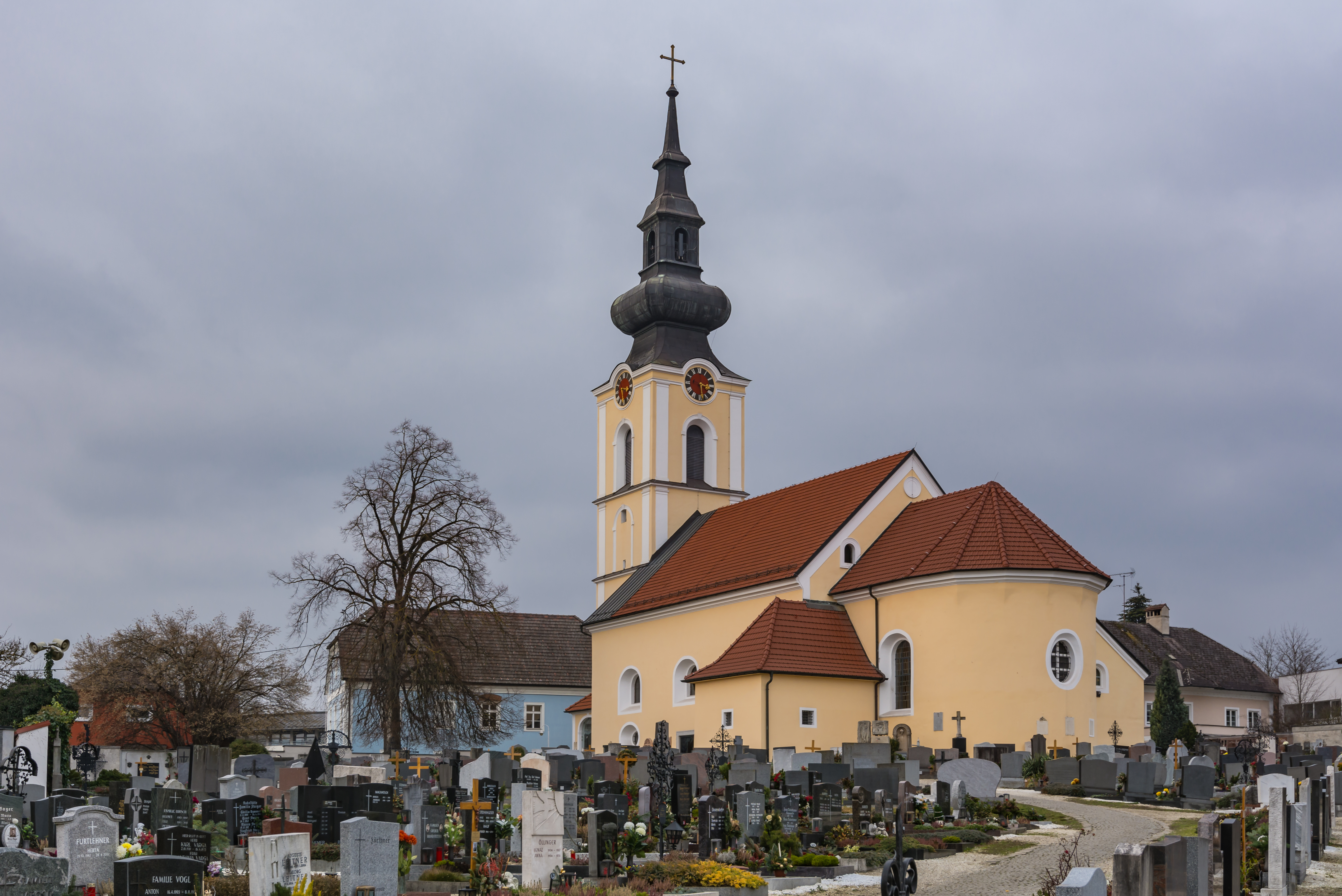 Die kath. Pfarrkirche hl. Michael mit Fried- und Kirchhof in Leonding ist im Kern gotisch und wurde im 17. Jahrhundert umgebaut.